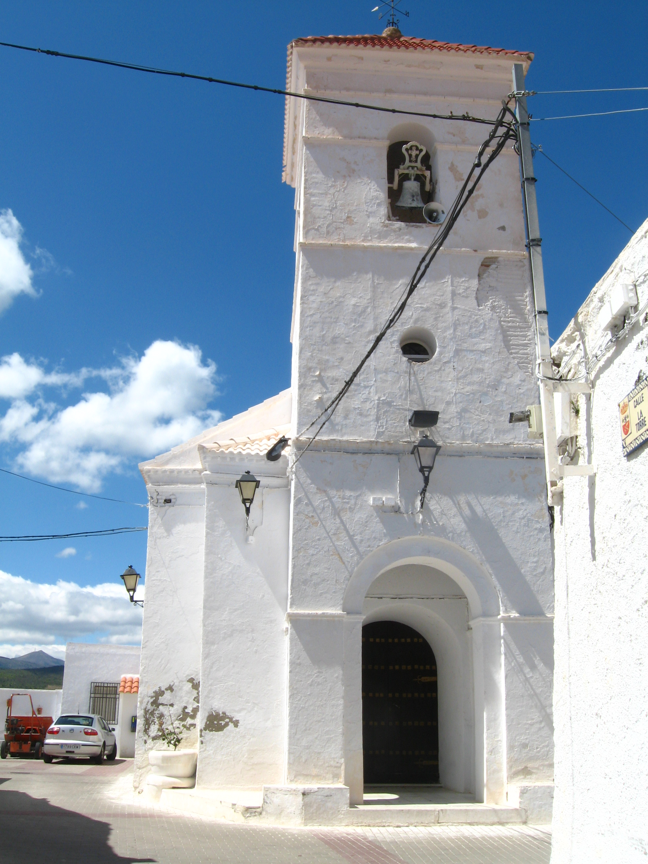 Iglesia de Nuestra Señora del Rosario, Alcudia de Monteagud, Almería.